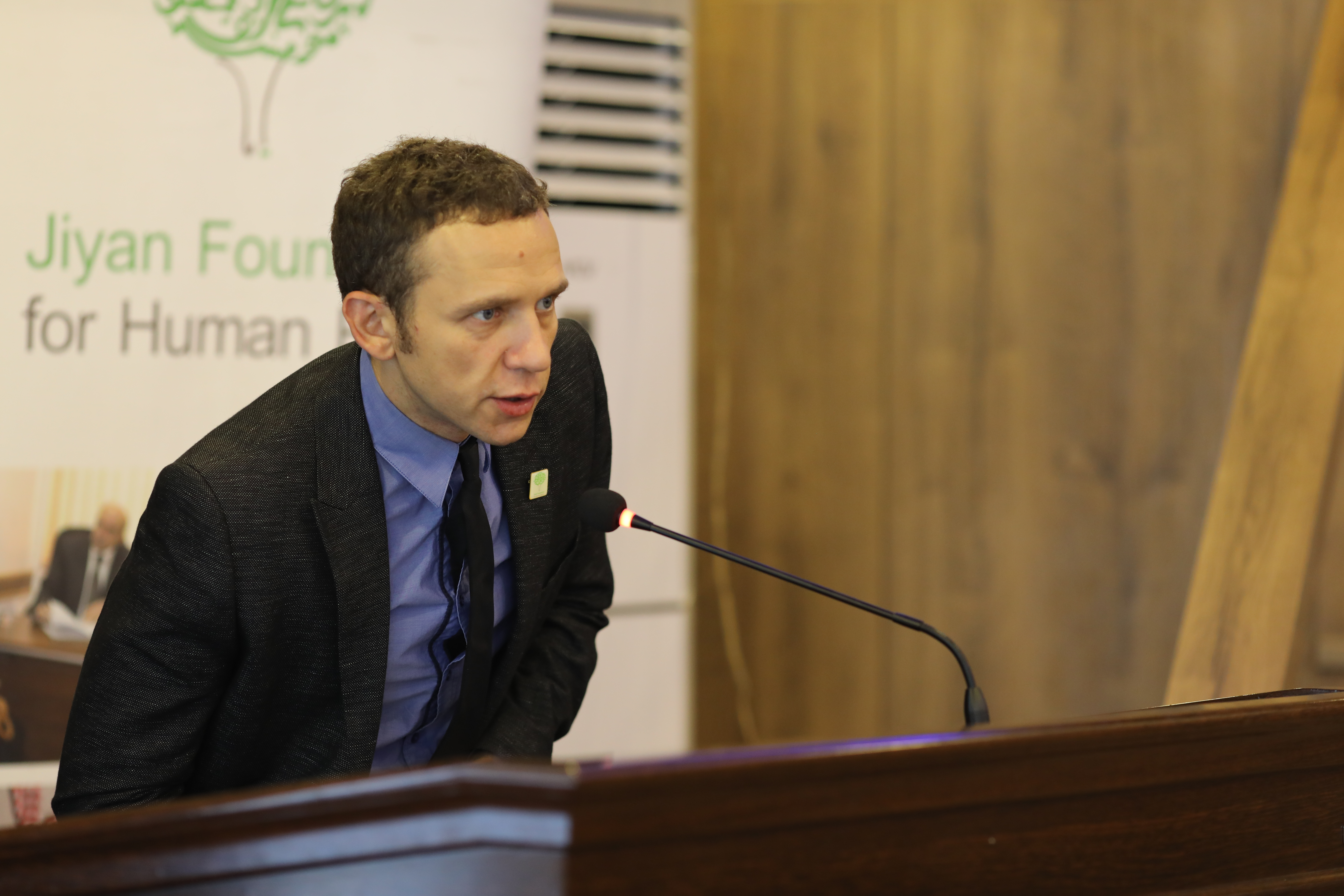 کوردی: وتاری بۆیان گاڤرلۆڤج لە مەراسیمی ڕاگەیاندنی هاوپەیمانی بۆ قەرەبووکردنەوەی دادپەروەرانە بە فەرمی